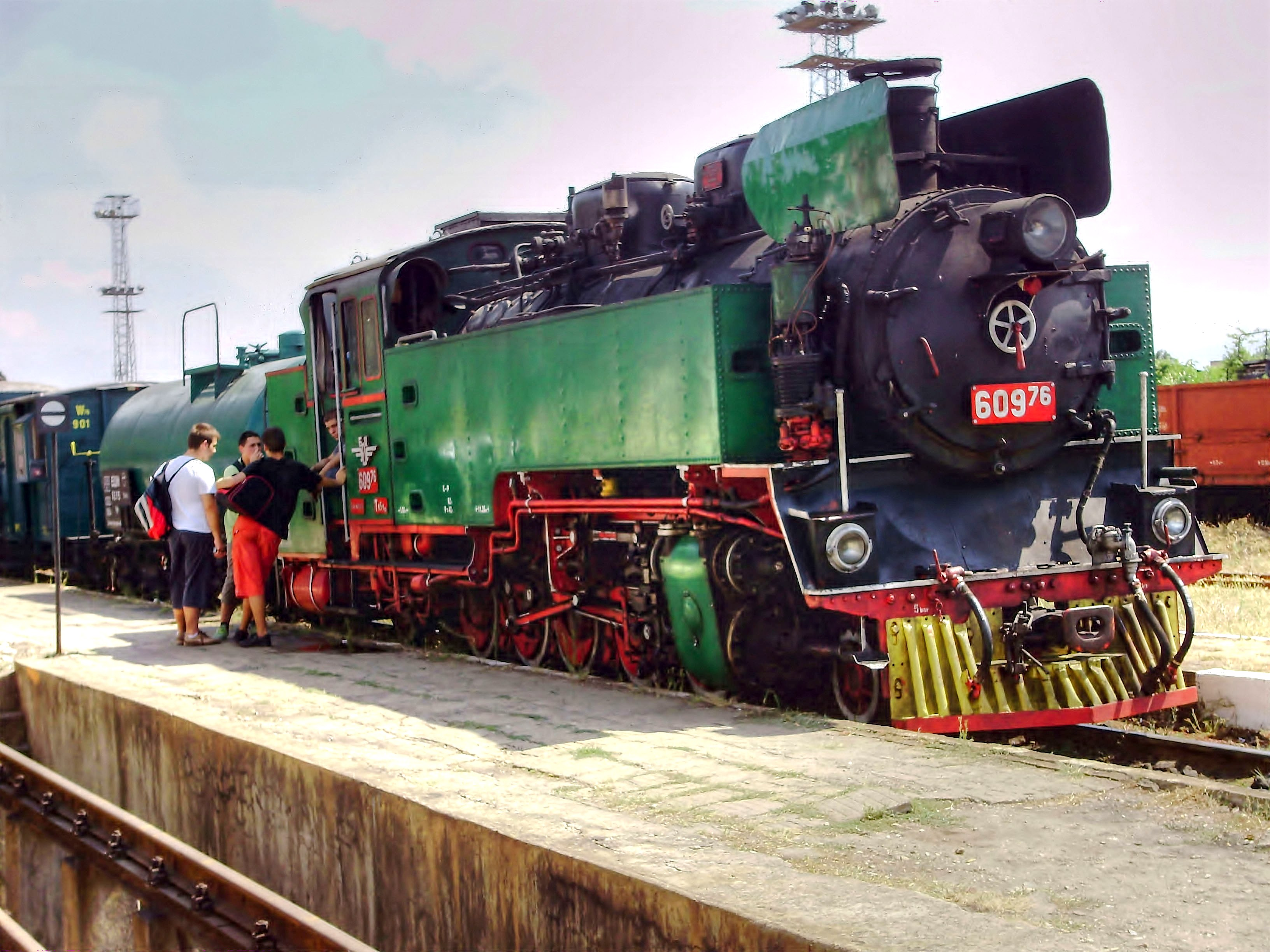 Парен локомотив 609.76